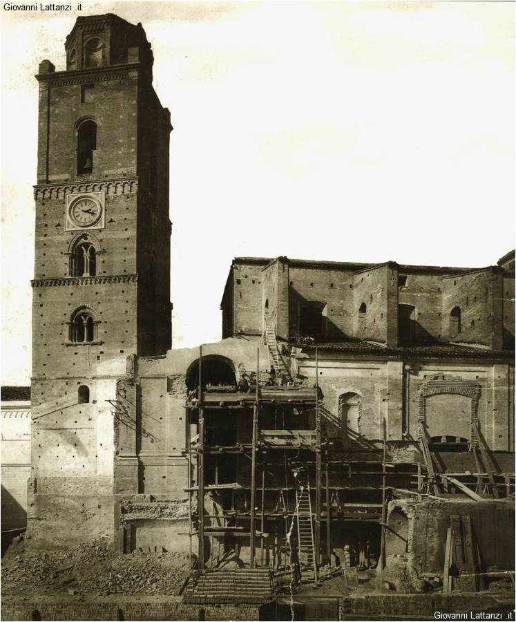 La cattedrale di Chieti, riconsacrata nel 1069, venne più volte modificata nel corso del tempo. In particolare, tra gli anni venti e trenta del XX secolo furono rimossi i rivestimenti neobarocchi voluti il secolo precedente da Monsignor Luigi Ruffo Scilla, anche negli spazi interni della chiesa.